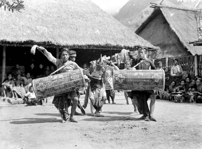 Negatief. Dans met trommels op Lombok